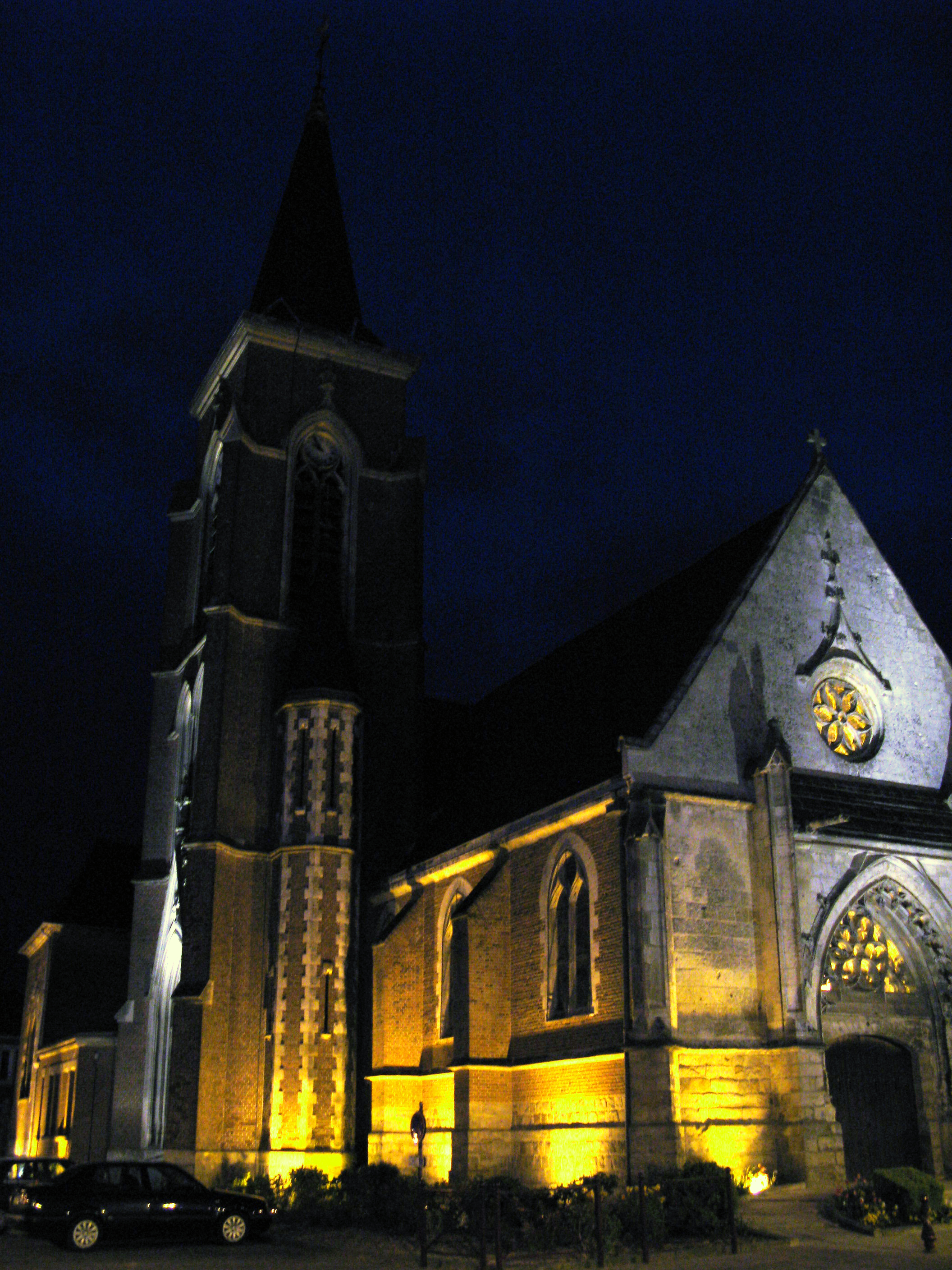 Crèvecoeur-le-Grand (Oise, France) - . . .